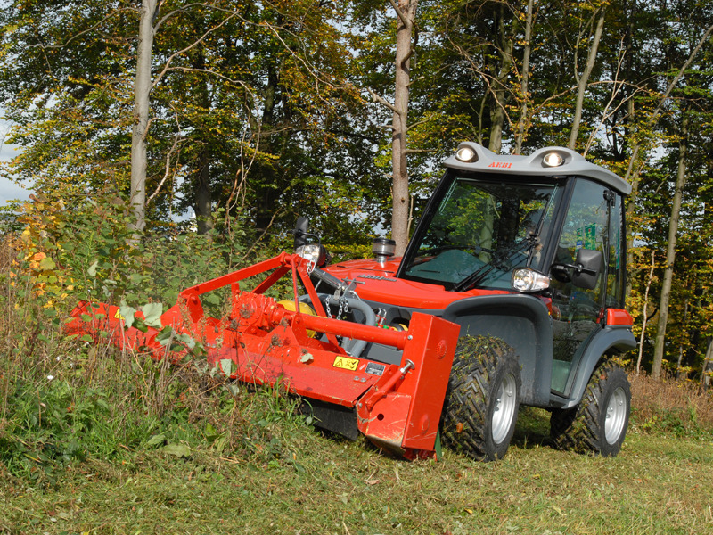 Aebi TT206 mit Schlägelmäher